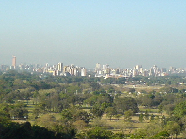 View to Maracay, Aragua state, Venezuela